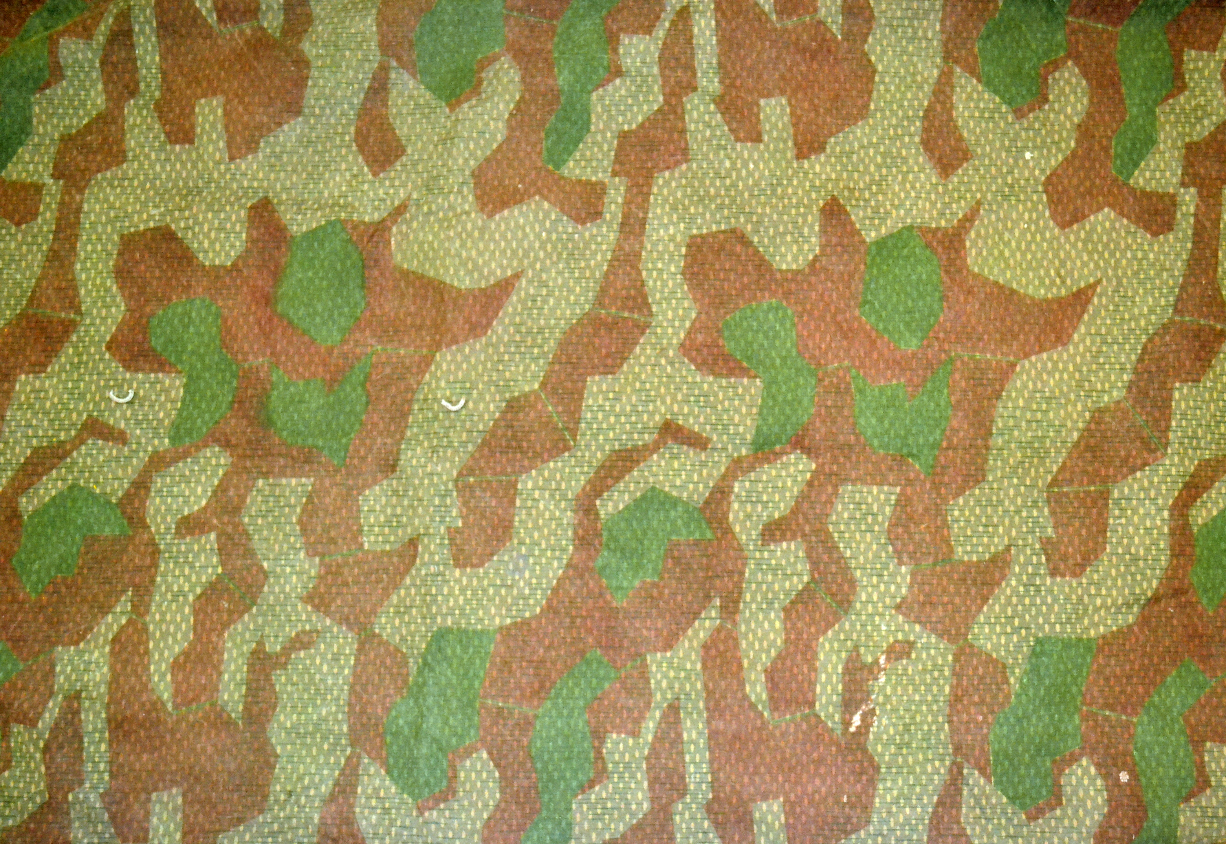 Schémas de camouflage des unités de tente 1901